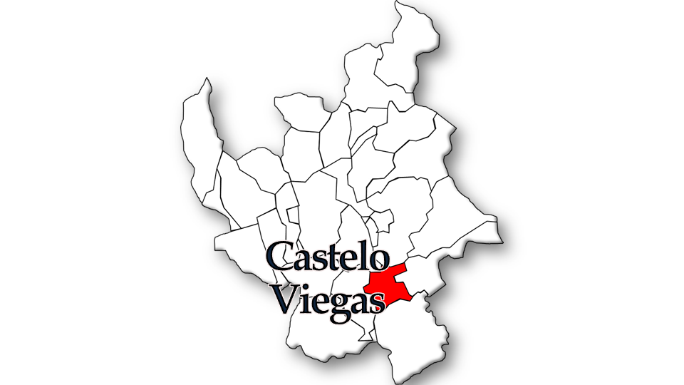 População